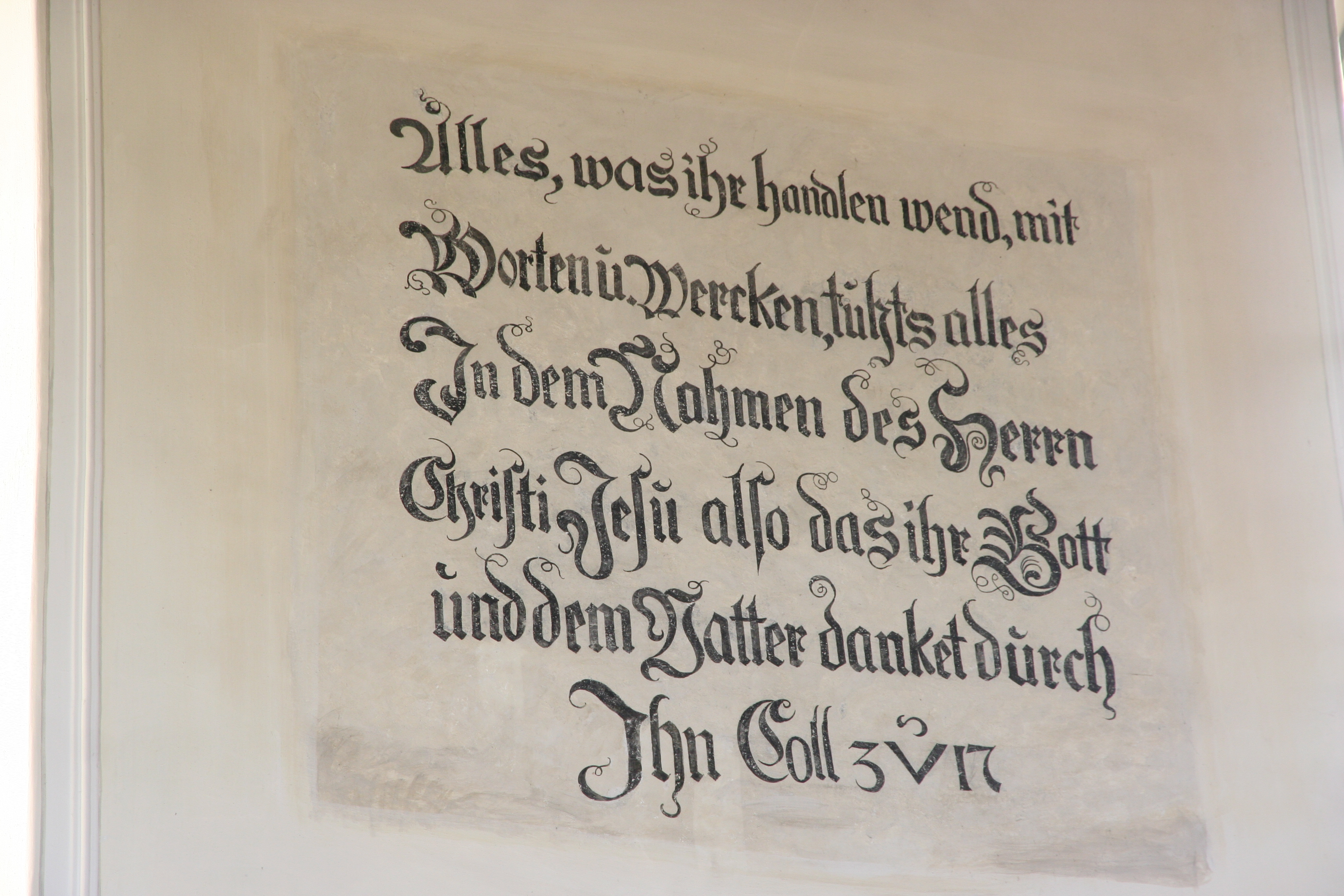 Evangelische Kirche St. Verena Müllheim TG